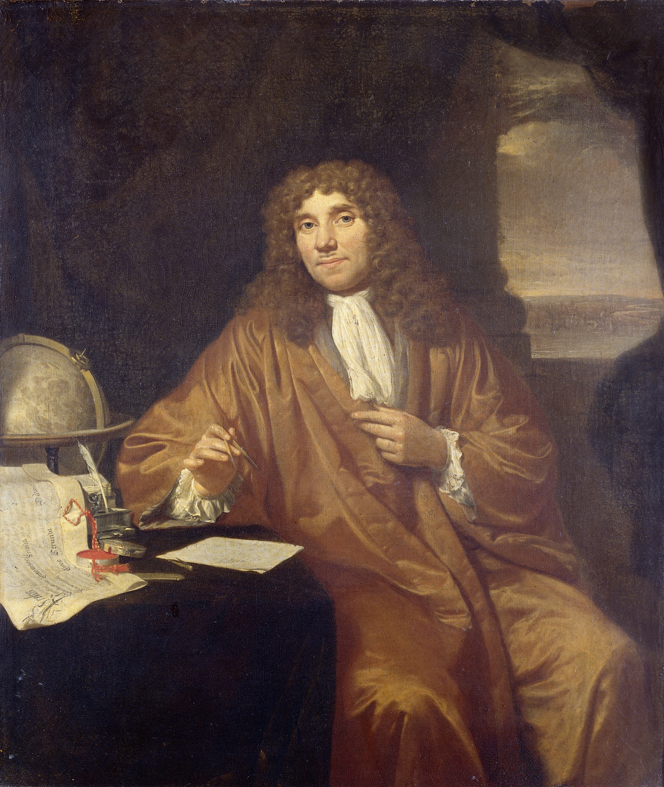 Portret van Anthonie van Leeuwenhoek (1632-1723), natuurkundige te Delft. Kniestuk, zittend aan een schrijftafel waarop een oorkonde ligt van zijn benoeming tot lid van de Royal Society of Physicians te Londen door Karel II. Verder ook een globe en een inktstel; hij houdt een passer in de hand.